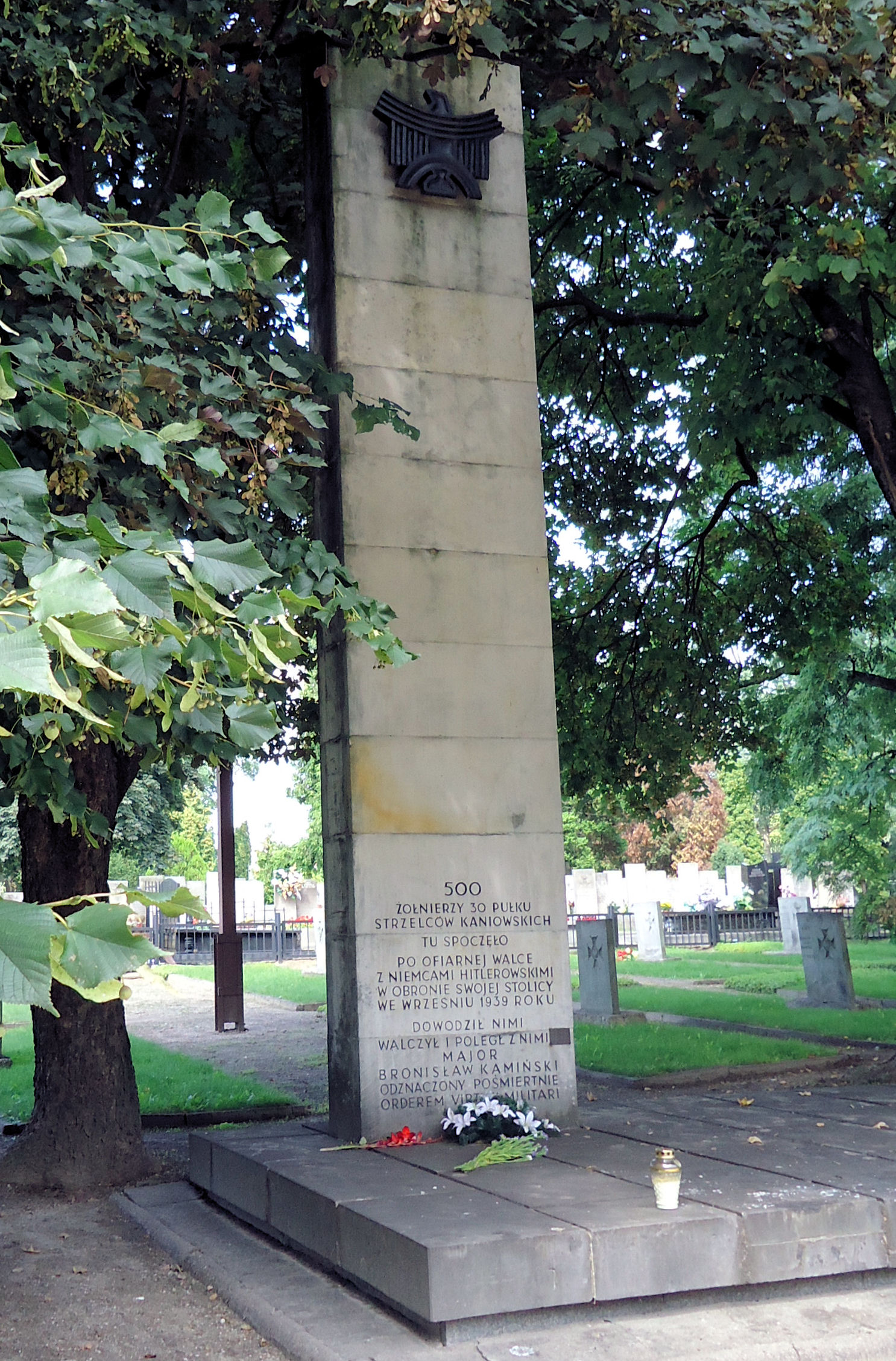 Pomnik żołnierzy 30 Pułku Strzelców Kaniowskich na Cmentarzu Wawrzyszewskim w Warszawie, poległych we wrześniu 1939